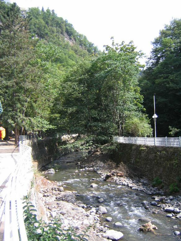 Bakurianistskali. Bakuriani, Georgia